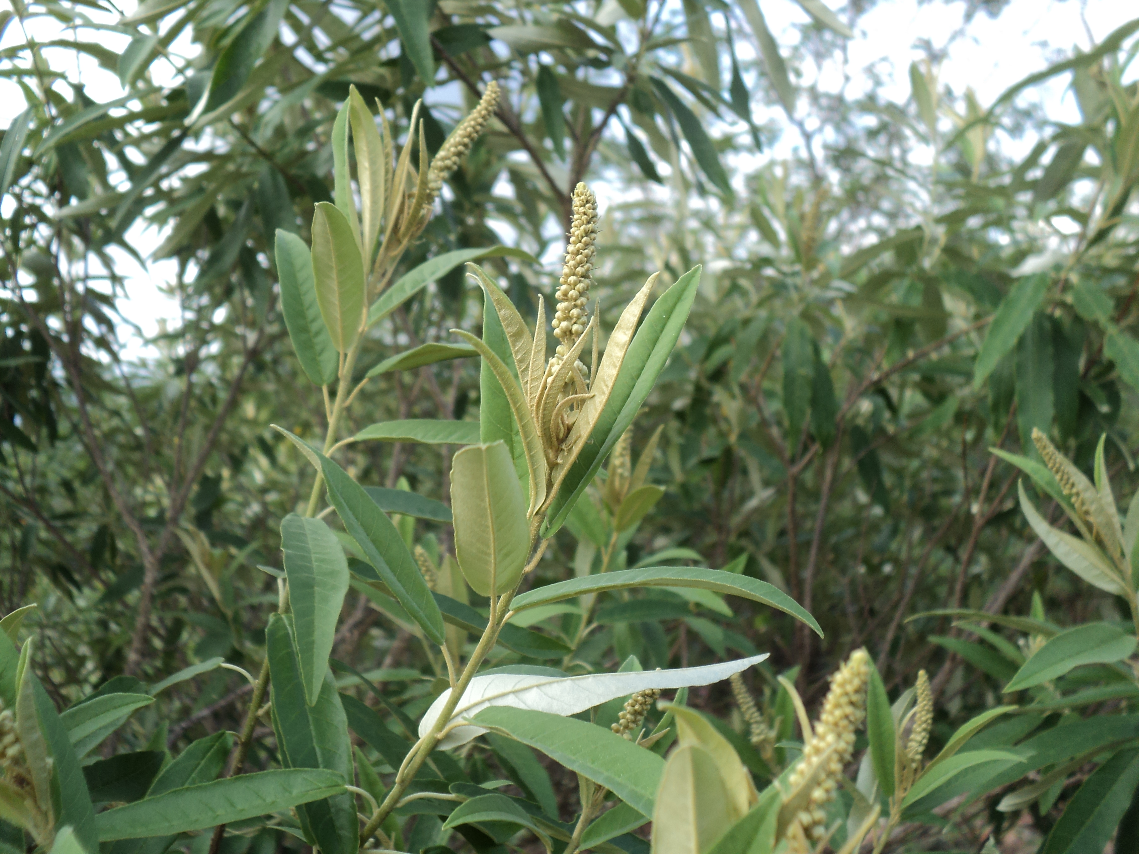 Julocotron humilis - sacatinga.